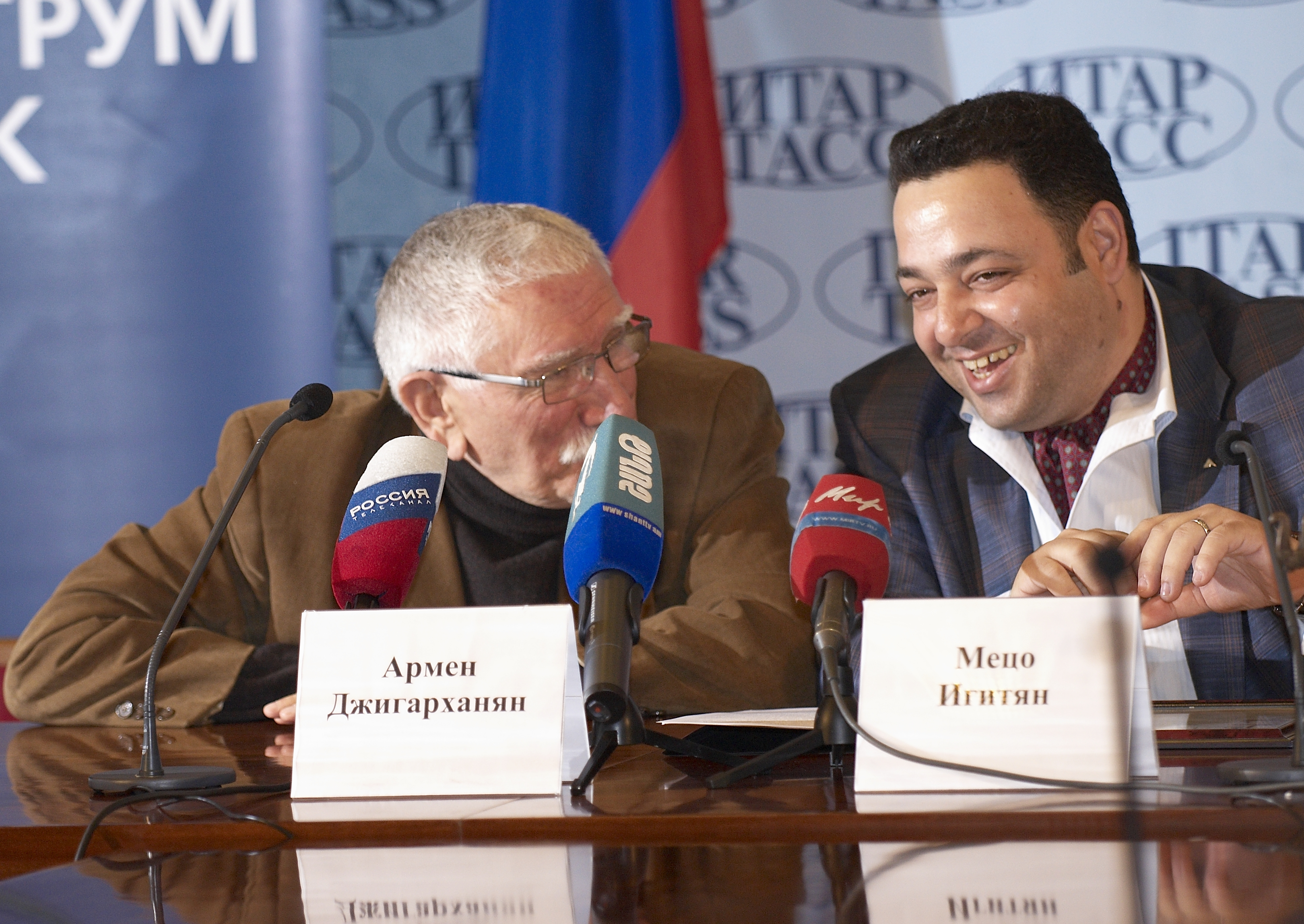 Пресс-конференция в ИТАР-ТАСС